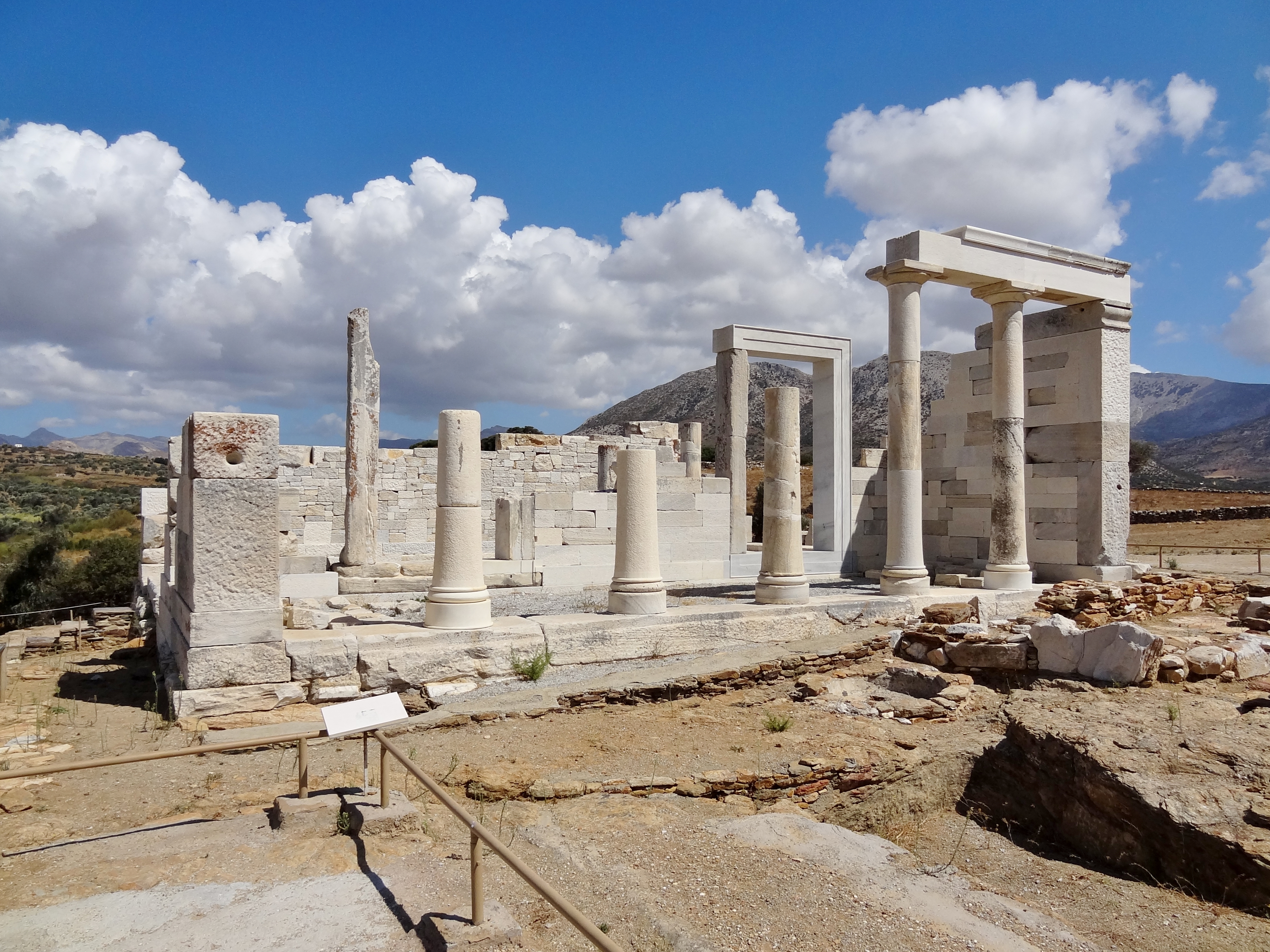 Demeter-Tempel von Gyroulas bei Ano Sangri auf Naxos, Kykladen, Griechenland